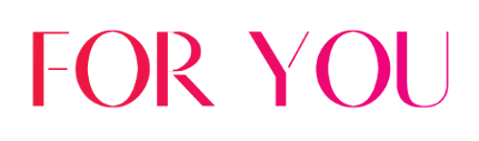 logo albumu For You